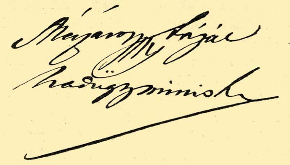 Mészáros Lázár hadügyminiszter aláírása (1848)